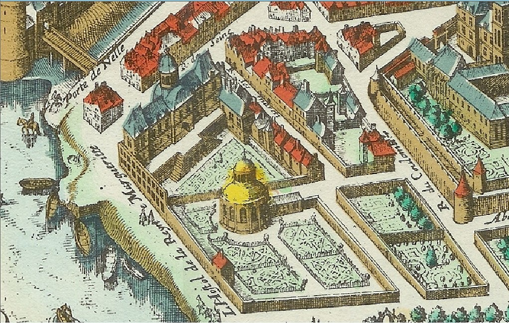 Matthäus Merian (Suisse, 1593-1650): LE PLAN DE LA VILLE, CITE, VNIVERSITE ET FAVX-BOVRGS DE PARIS AVEC LA DESCRIPTION DE SON ANTIQVITE ET SINGVLIARITES, dit Plan de Mérian, 1615, détail.Au centre, l'Hôtel de la reine Marguerite dit aussi Hôtel de la reine Margot (détruit, à l'emplacement de l'actuelle École des beaux-arts / Ensba, rue de la Seine, 6e arrdt., Paris) avec ses jardins au milieu desquels s'élève la chapelle des Louanges ; à gauche, la rive gauche (animée) de la Seine vers l’aval où des barques sont amarrées au port des Passeurs et le quai (devenu Quai Malaquais) en direction du pont de la porte de Nelle (porte de Nesle) menant à la tour du même nom ; à droite, une partie de l’enclos de l'abbaye de Saint-Germain-des-Prés. Les rues parallèles au quai sont, de gauche à droite, la rue des Marets (rue des Marais, actuelle rue Visconti) et la rue du Coulombier (rue du Colombier, actuelle section est de la rue Jacob), celles partant du quai en direction du sud (à droite sur la carte) sont, en haut, la rue des Fossés de Nesle (actuelle rue Mazarine) dont l'extrémité, côté Seine est aménagée en abreuvoir, et la rue de Seine, en bas la rue des Saints-Pères. Au centre, l’ancien chemin de la Noue (actuelle rue Bonaparte), dit aussi rue de la Petite Seine, puis rue des Petits-Augustins divise les jardins de la reine en deux parties pour permettre l'accès à la chapelle des Louanges, mais se termine encore en cul de sac côté quai.